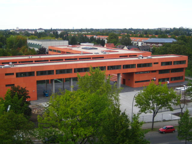 Neubau der Carl-Zeiss-Oberschule